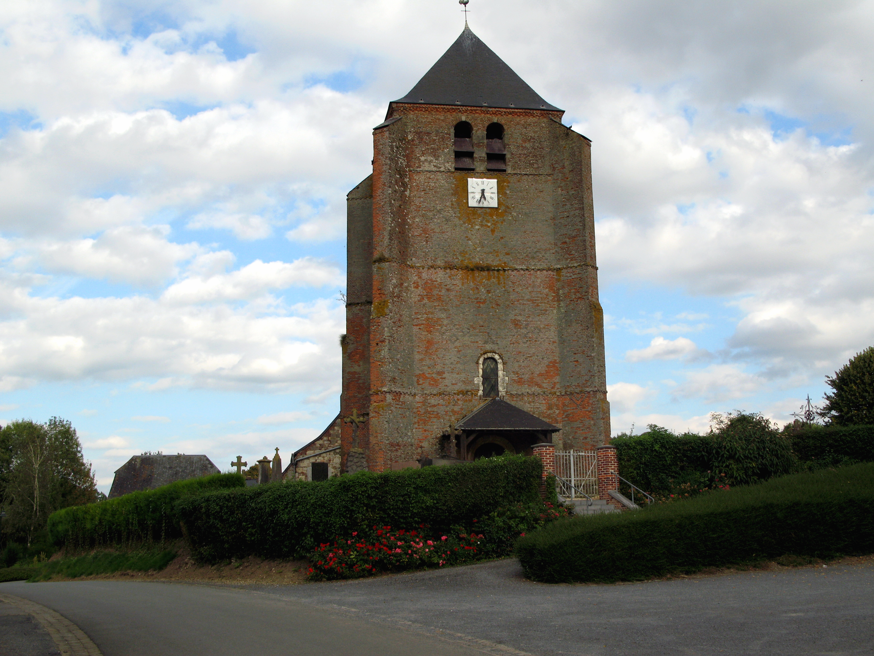 Hary (Aisne, France) - L'église fortifiée. La rue fait un arc de cercle pour contourner l'église fortifiée et son cimetière.